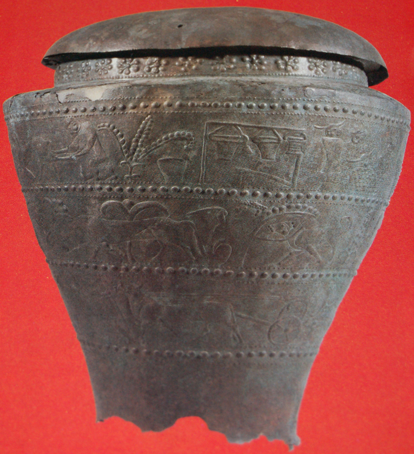 Fotografia di una situla veneta tratta da Il Veneto nell'antichità: preistoria e protostoria di A. Aspes, libro stampato a Verona nel 1984.